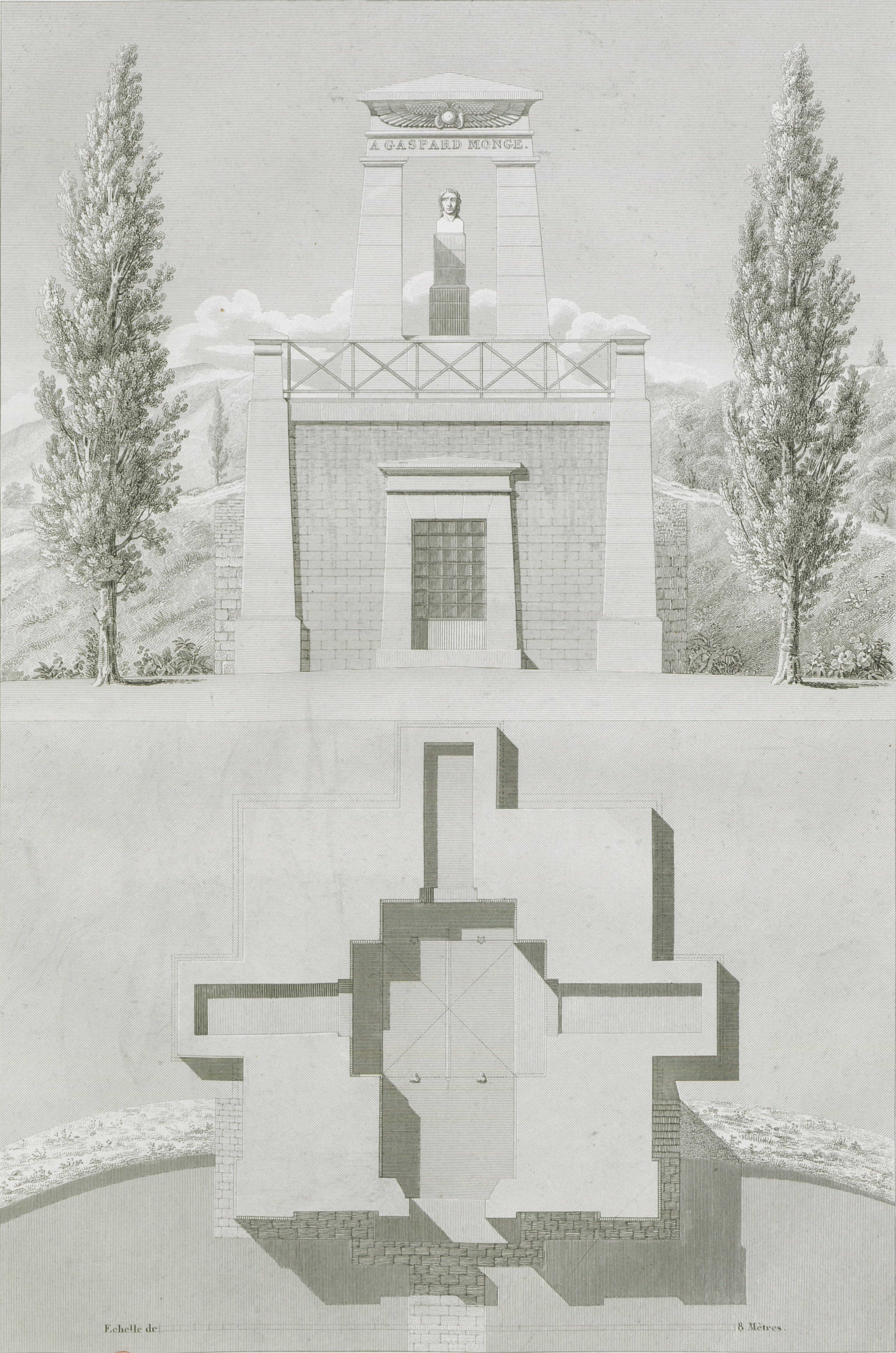 Plan et élévation du tombeau de Gaspard Monge gravés par Hibon et Fortier.